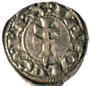 Dinero aragonés (tipo jaqués) del reinado de Jaime I el Conquistador (1213-1276)